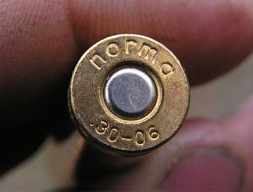 Nedre delen på en patron